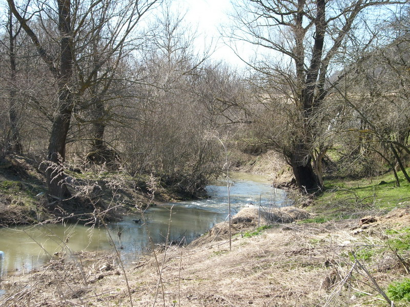 Селската река "Дермен дере", извираща от село Момино. Началото на река Черни Лом